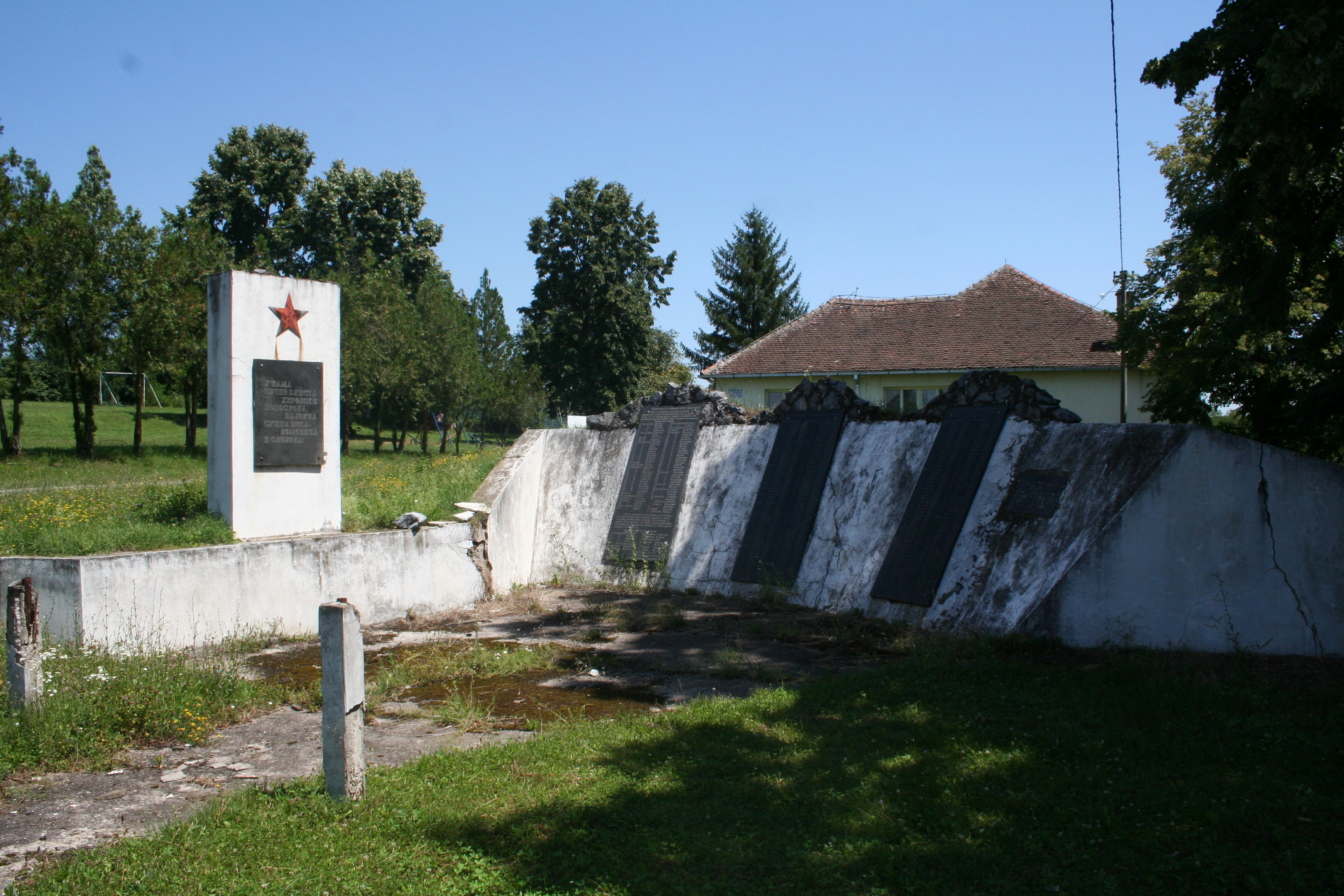 Spomenik NOB-a, Veliko Selo